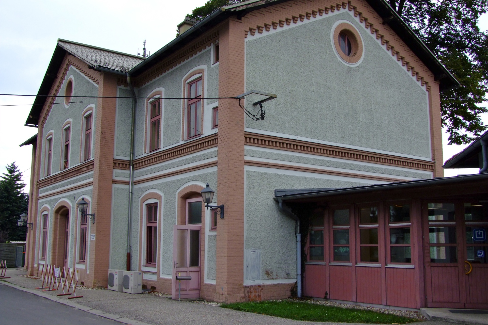 Aufnahmsgebäude Siebenbrunn-Leopoldsdorf